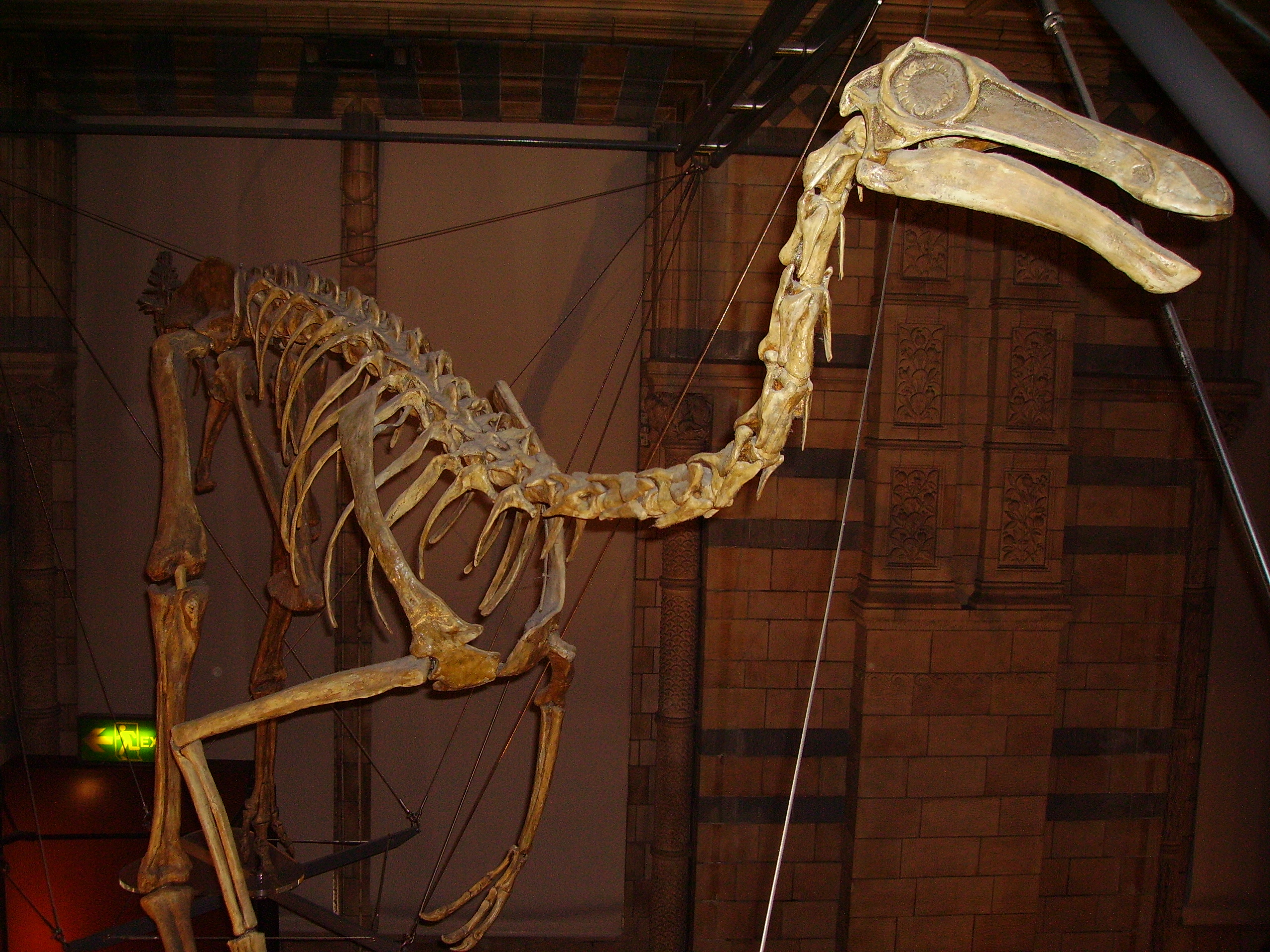 Žemaitėška: Galimima griautē.